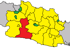 Peta status Indeks Pembangunan Manusia kabupaten dan kota Jawa Barat pada tahun 2010.